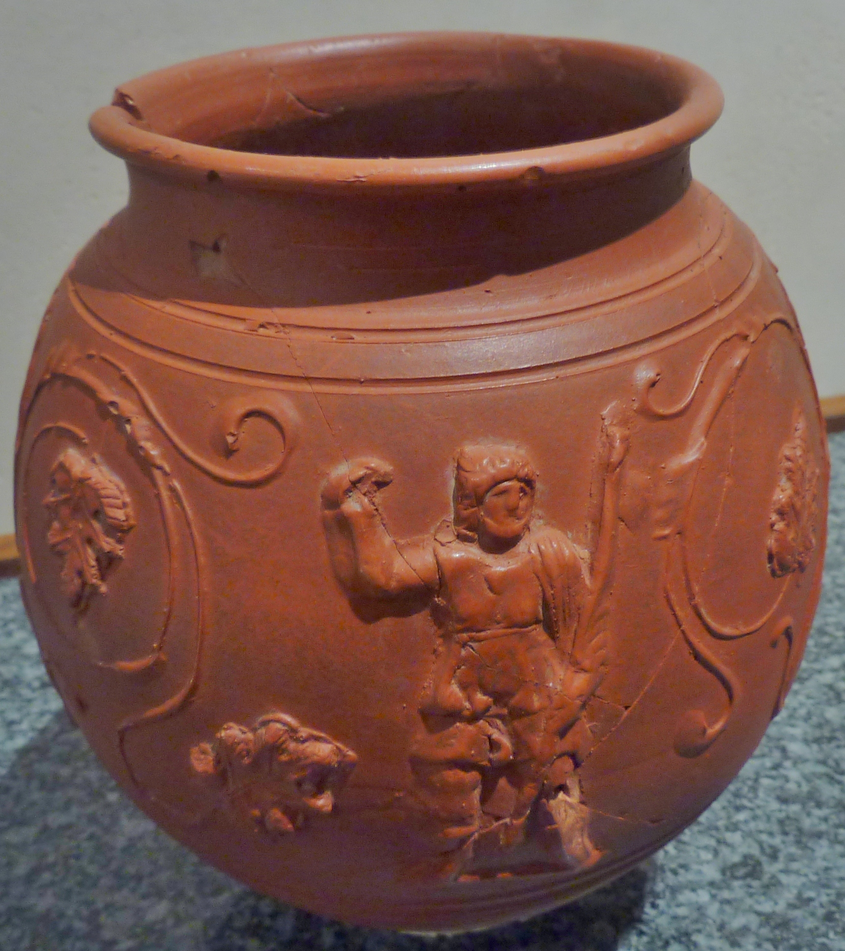 Carhaix (Vorgium) : vase gallo-romain à décor de guerrier, du dieu Bacchus et de pampres en terre cuite sigillée datée entre 180 et 250 après JC (Musée départemental breton de Quimper)